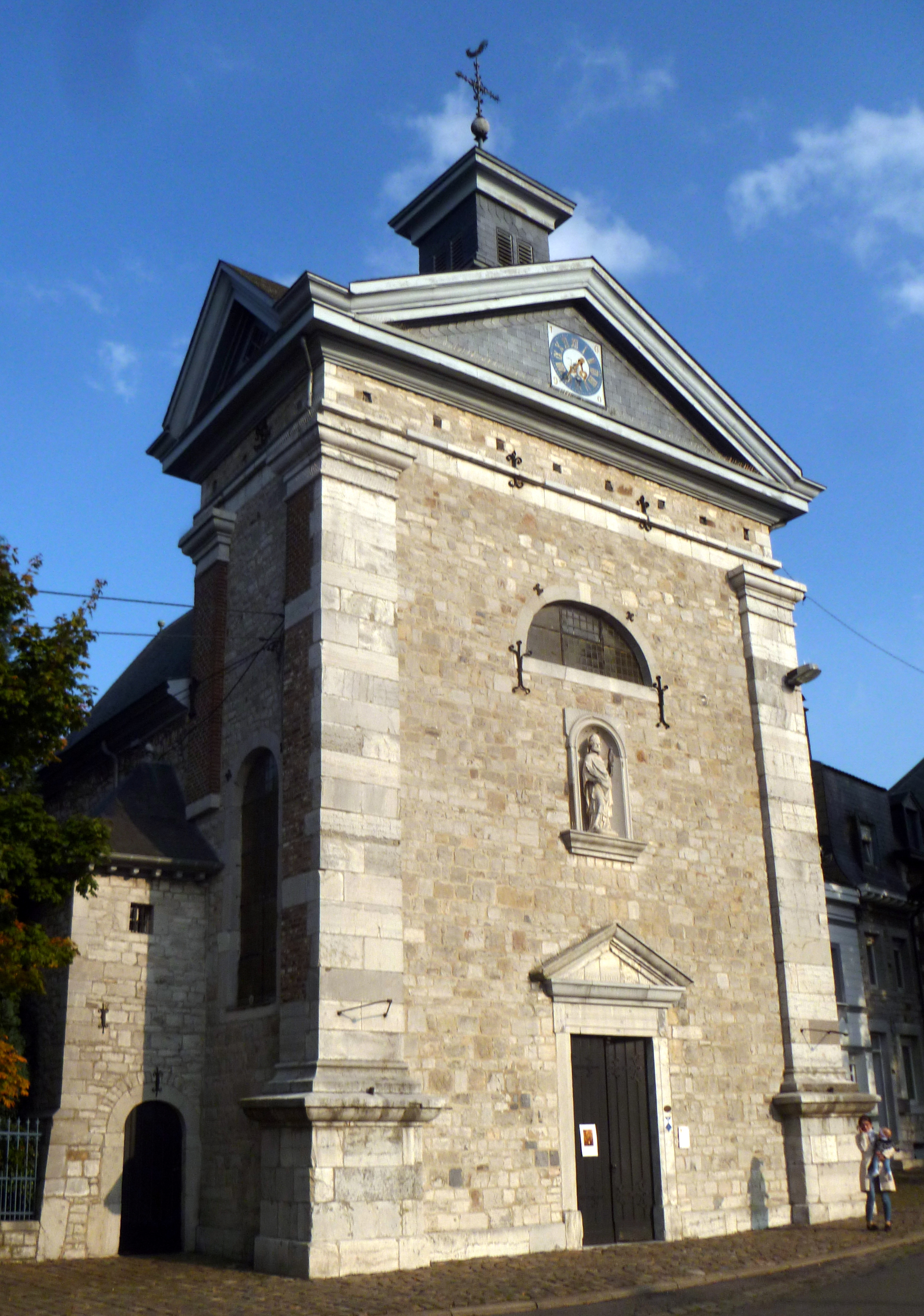 Lambertuskapelle Eupen, Frontseite